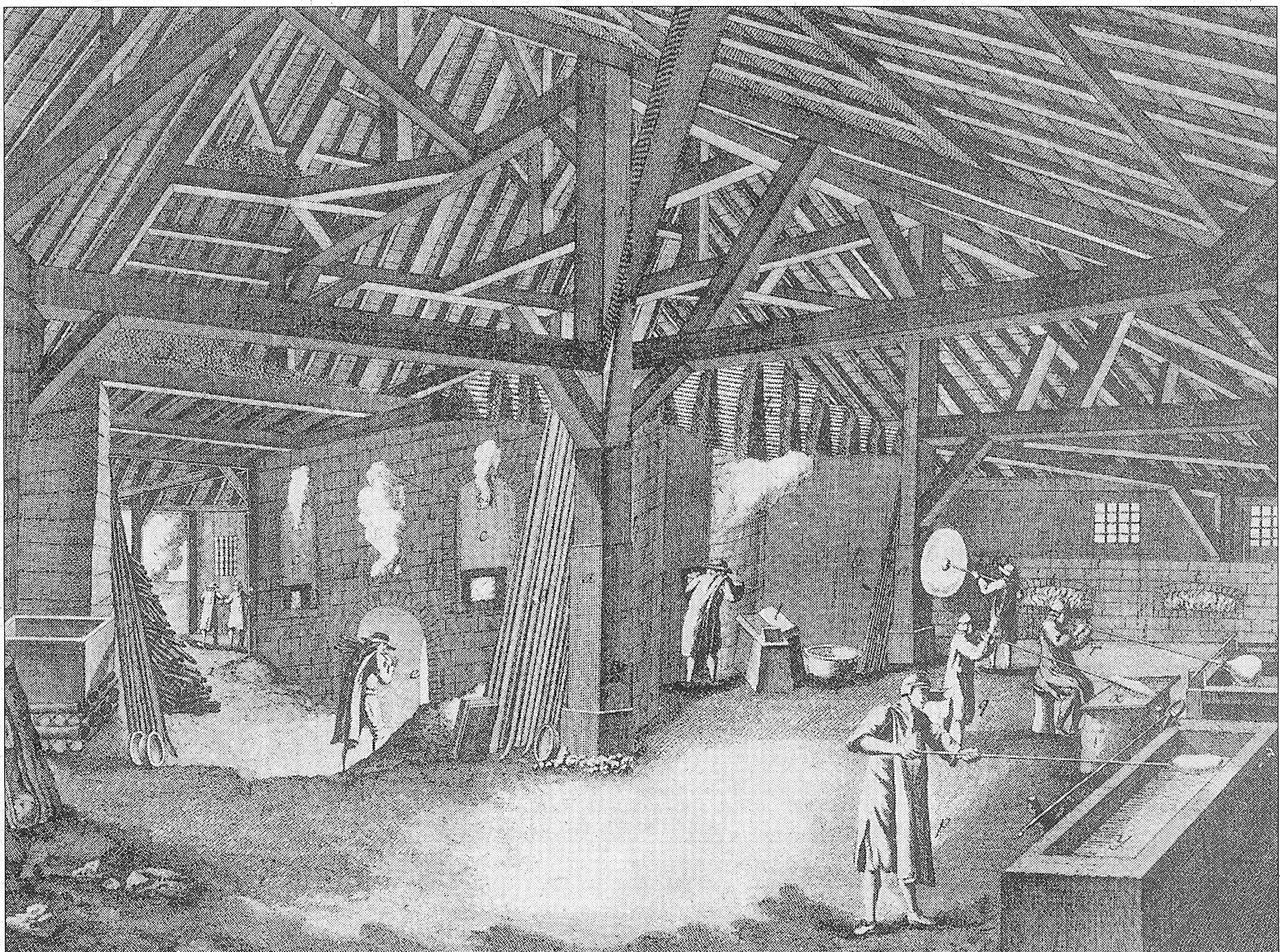 Glashütte Weibersbrunn im Spessart, gegründet 1706 als Betrieb der Kurmainzischen Spiegelmanufaktur, 1717 als Weibersbrunner Spiegelhütte, besonders qualifizierte Kelchmacher fertigen die begehrte Barockkelche und Barockpokale, später Umstellung der Produktion auf das "Mondglas", halbkreisförmig geliefertes Scheibenglas, durch das Weibersbrunn international bekannt wurde Darstellung aus dem 18. Jahrhundert, Rechte abgelaufen, Public Domain